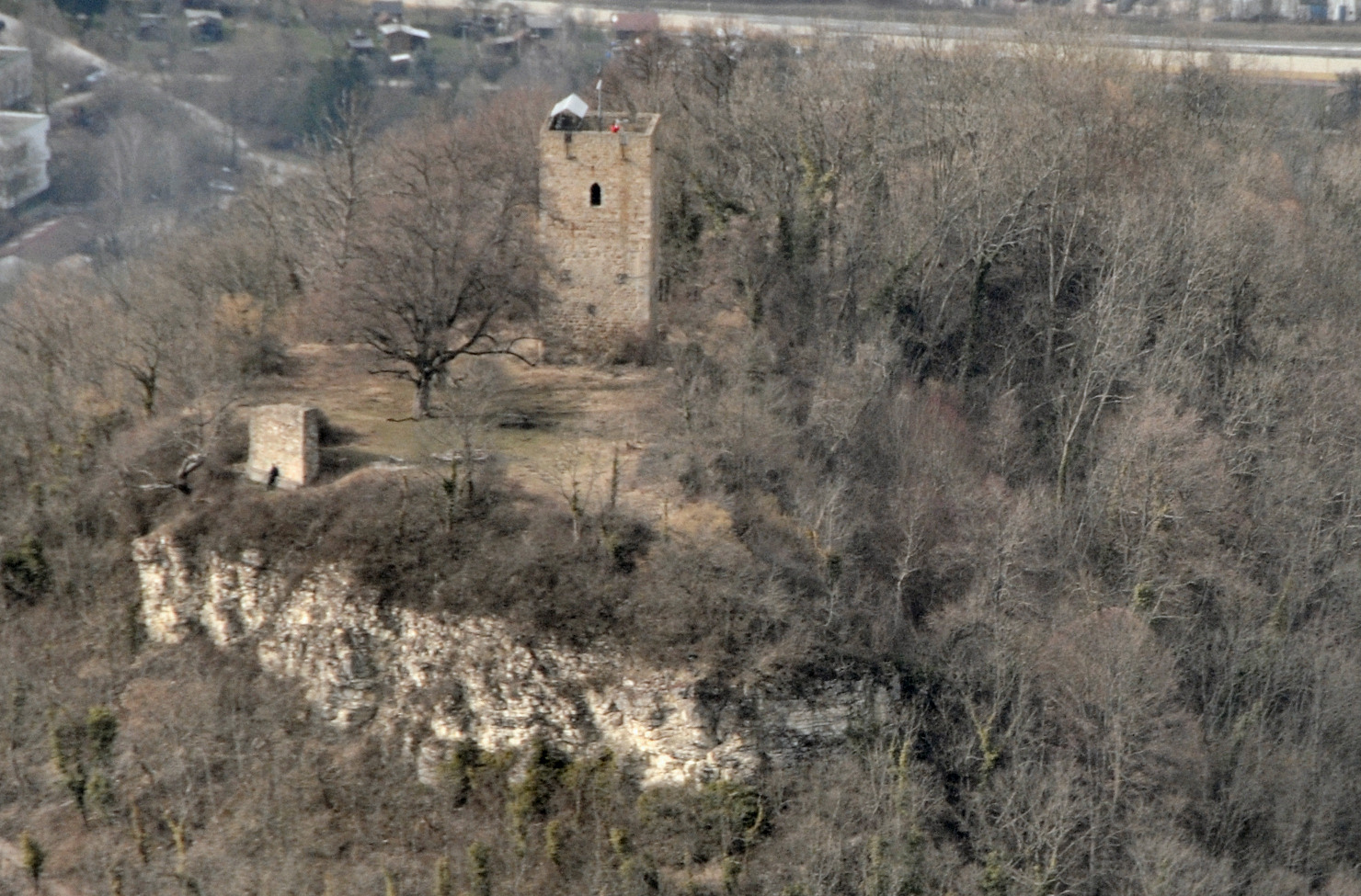 Luftbild der Burgruine Achalm in Reutlingen